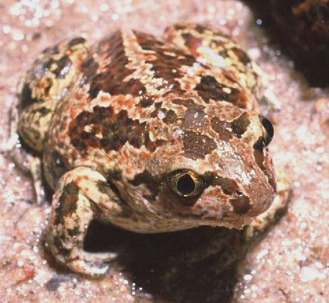 Knoblauchkröte Habitus - Foto: M. Linnenbach GNU FDL